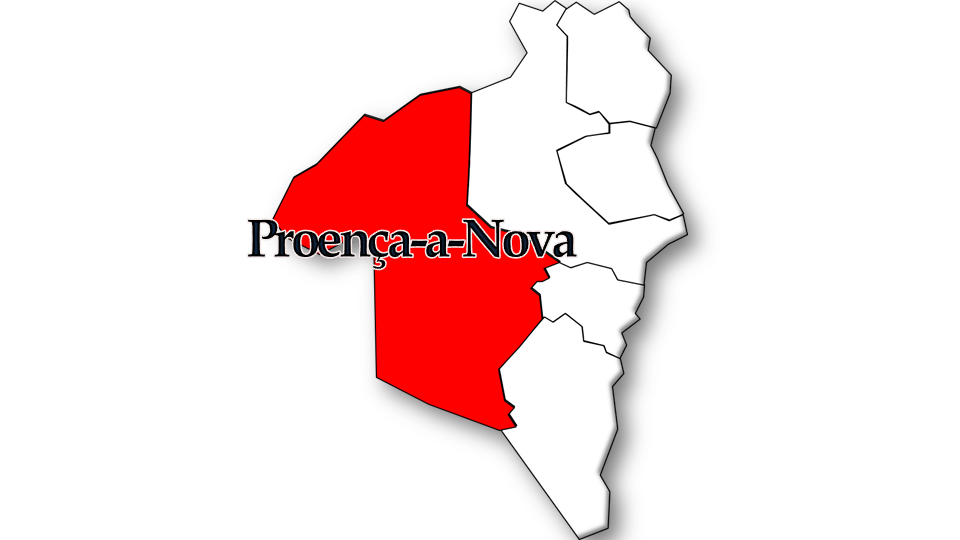 População